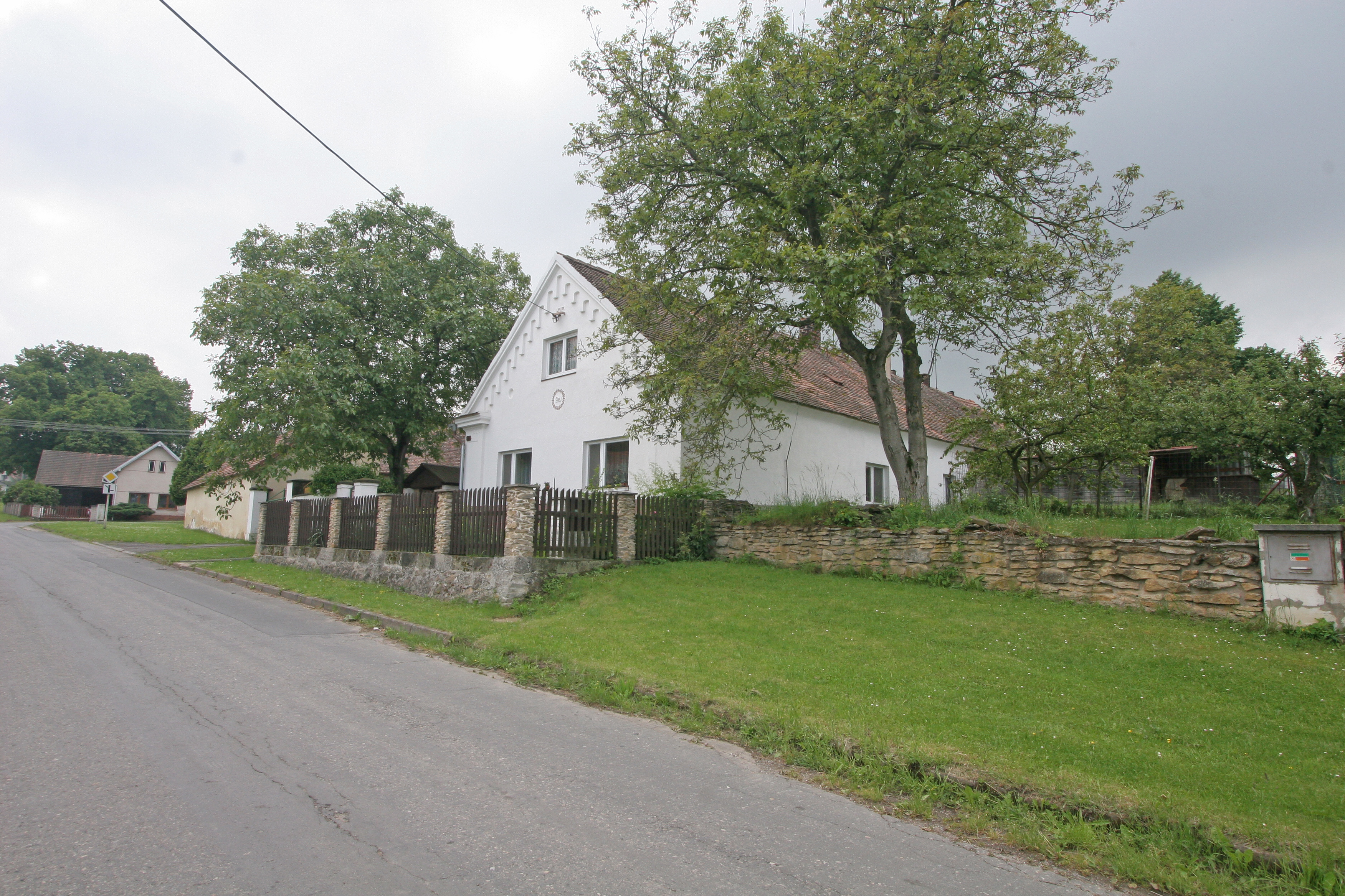 Janovice čp. 39